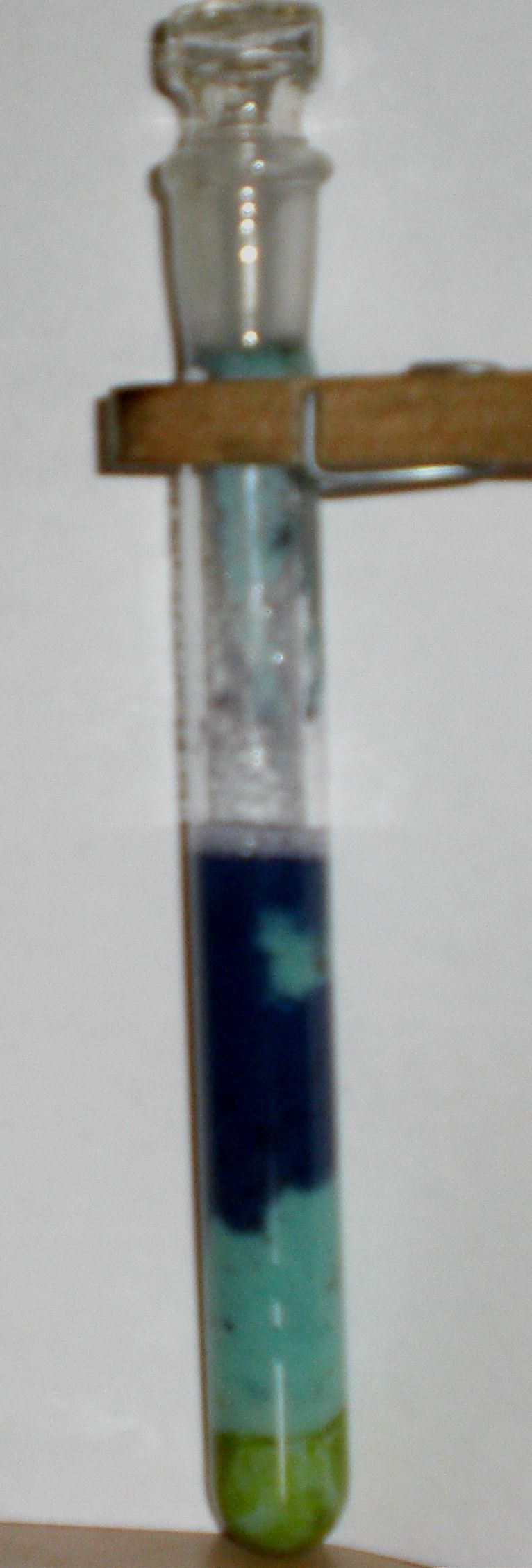 Biuretprobe mit Eigelb vom Hühnerei